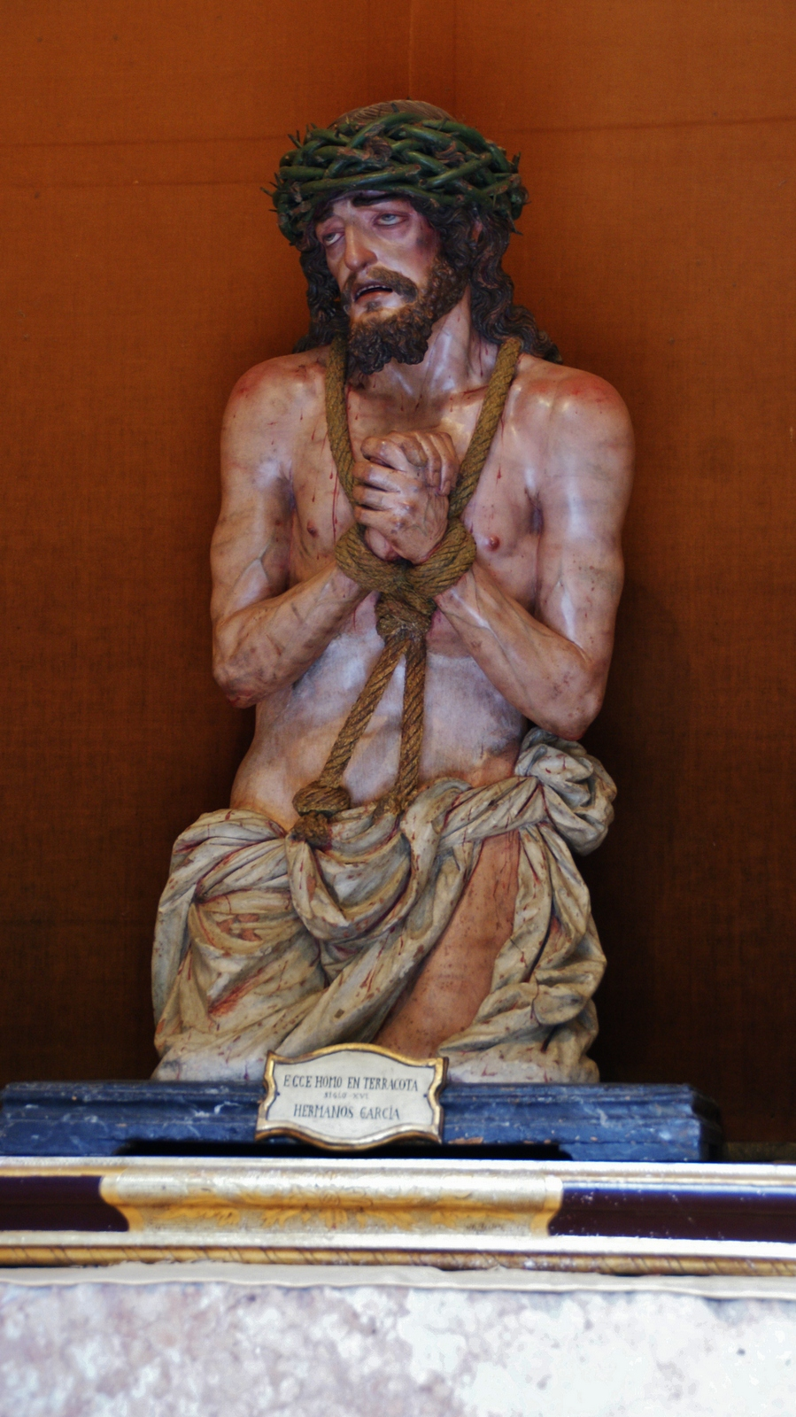 Monasterio de Nuestra Señora de la Asunción, más conocido como la Cartuja de Granada. Se comenzó a construir en el siglo XVI (1506) y su construcción duró 3 siglos, hasta el XIX. Este Ecce Homo en terracota se debe a los hermanos García